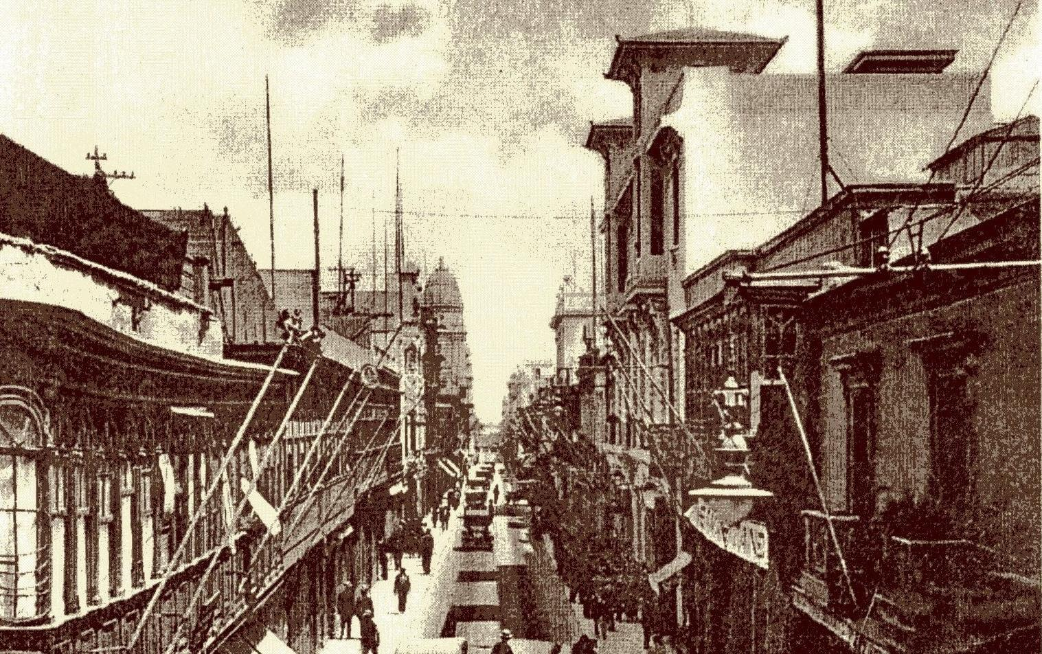 Jiron de la Unión in Lima, Peru